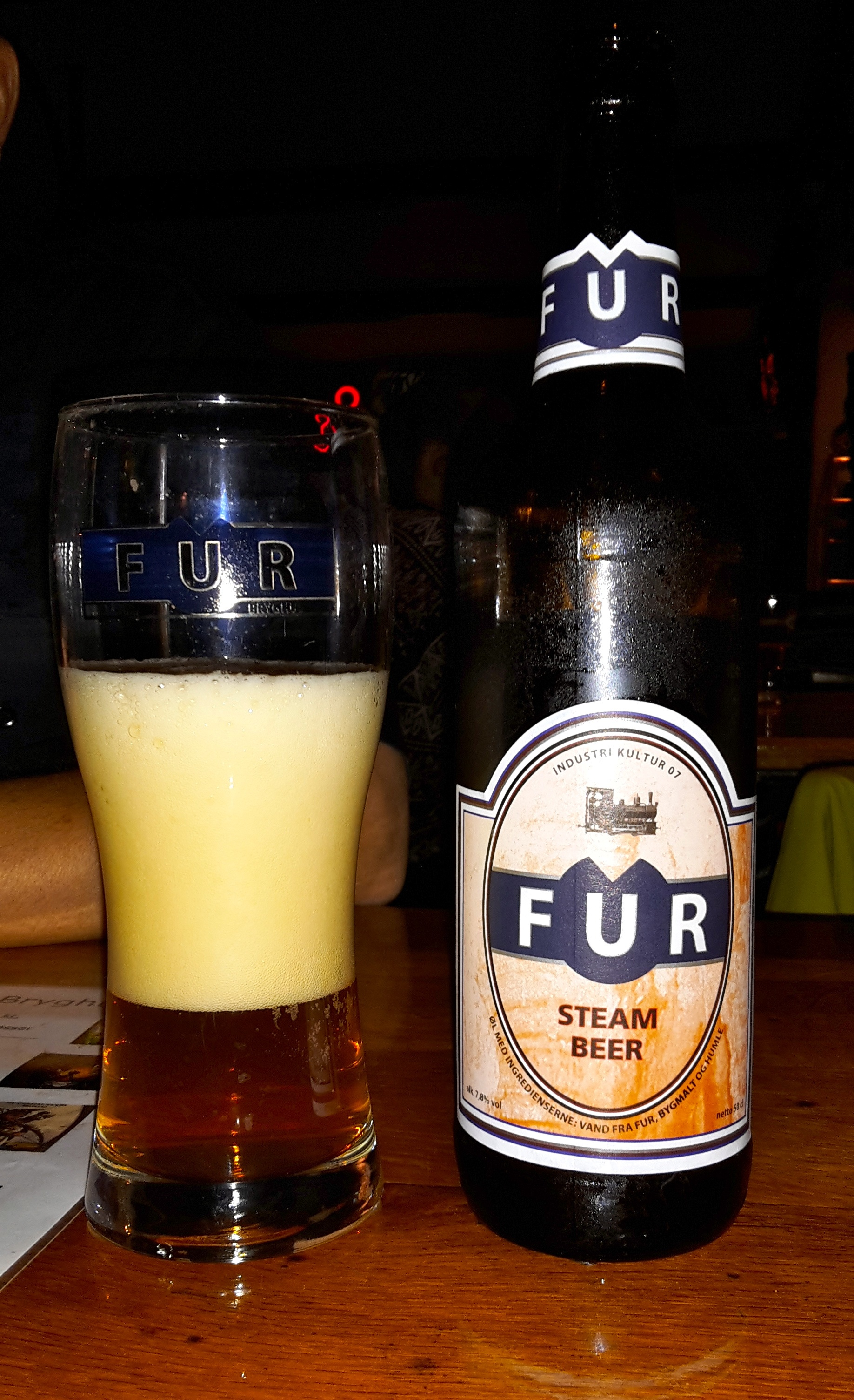 Fur Steam beer